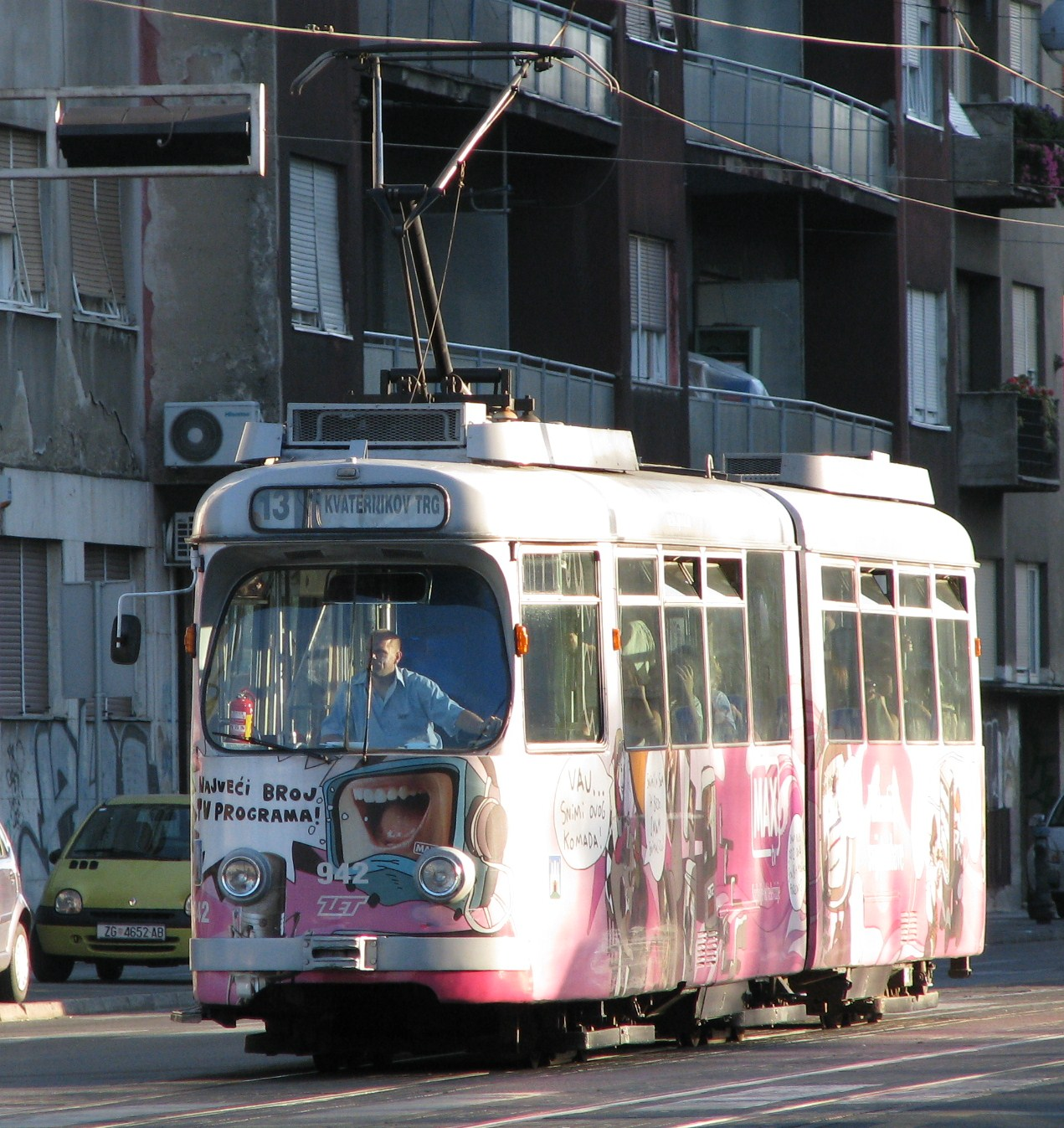 Tram TK942 Zagreb.JPG